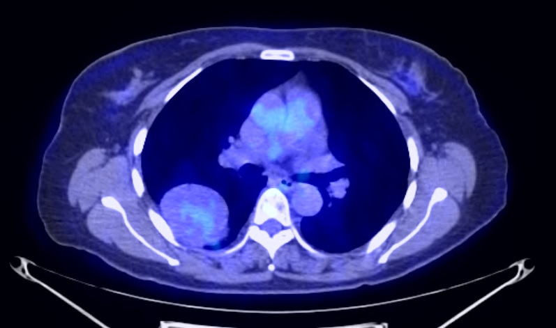 Tumeur fibreuse solitaire de la plèvre.